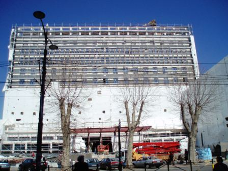 Fotografija zgrade: arhitekt Dragiša Brašovan Beograd, Zgrada hotela Metropol Beograd u rekonstrukciji, autor fotografije Nicolo